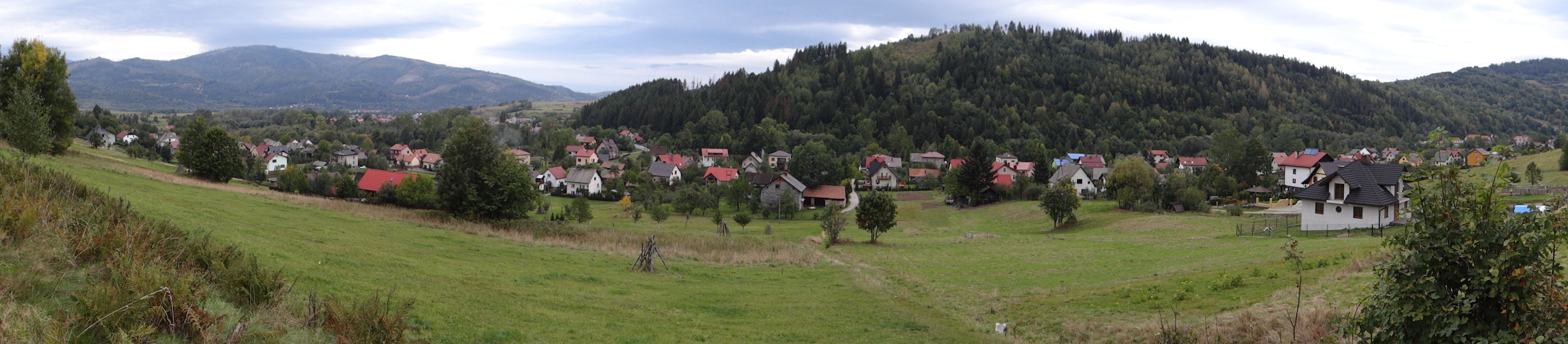 Wodok na Grapę ze stoków Palenicy